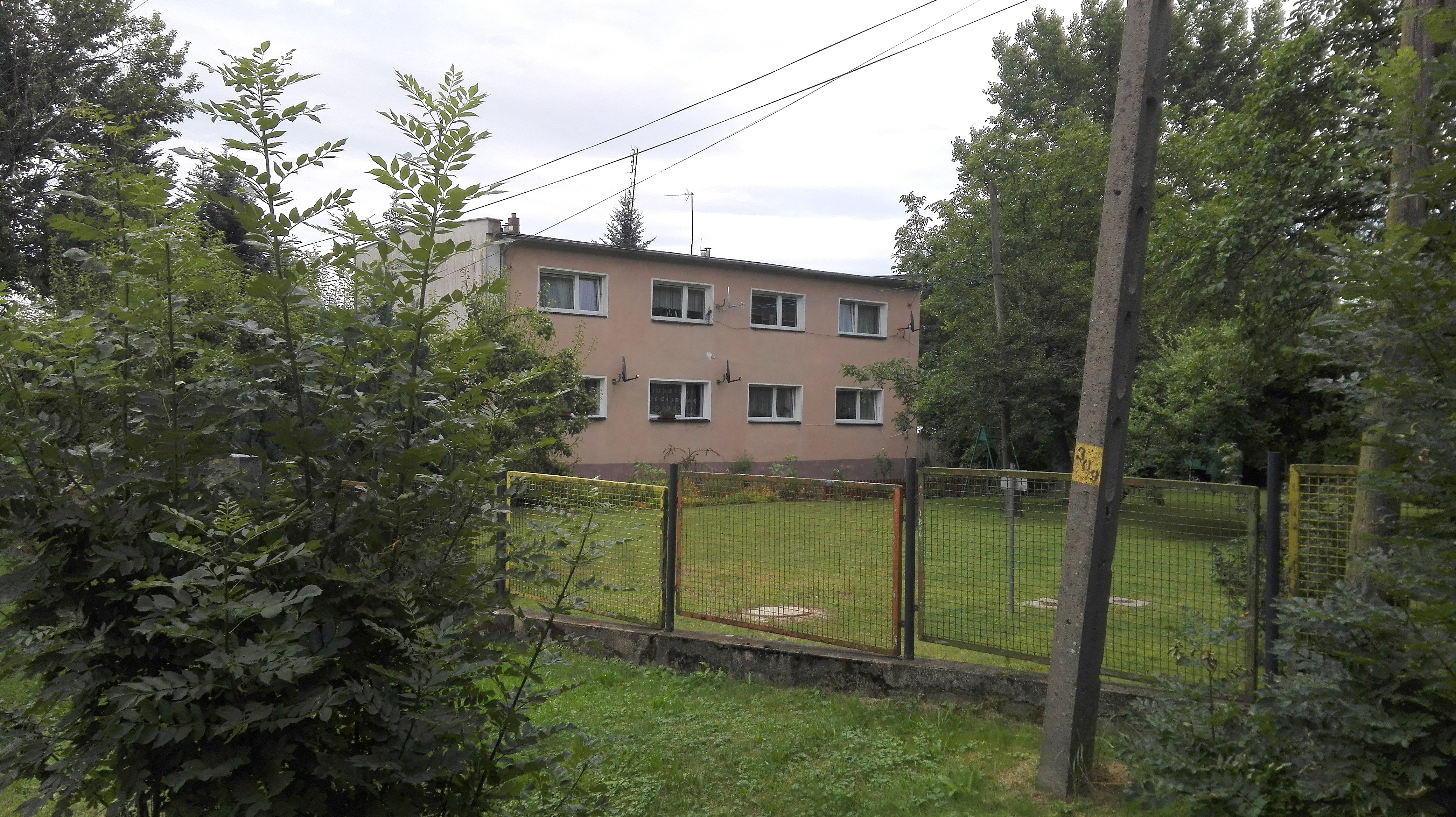 Blok mieszkalny. Dawniej blok mieszkalny kadry strażnicy Wojsk Ochrony Pogranicza.